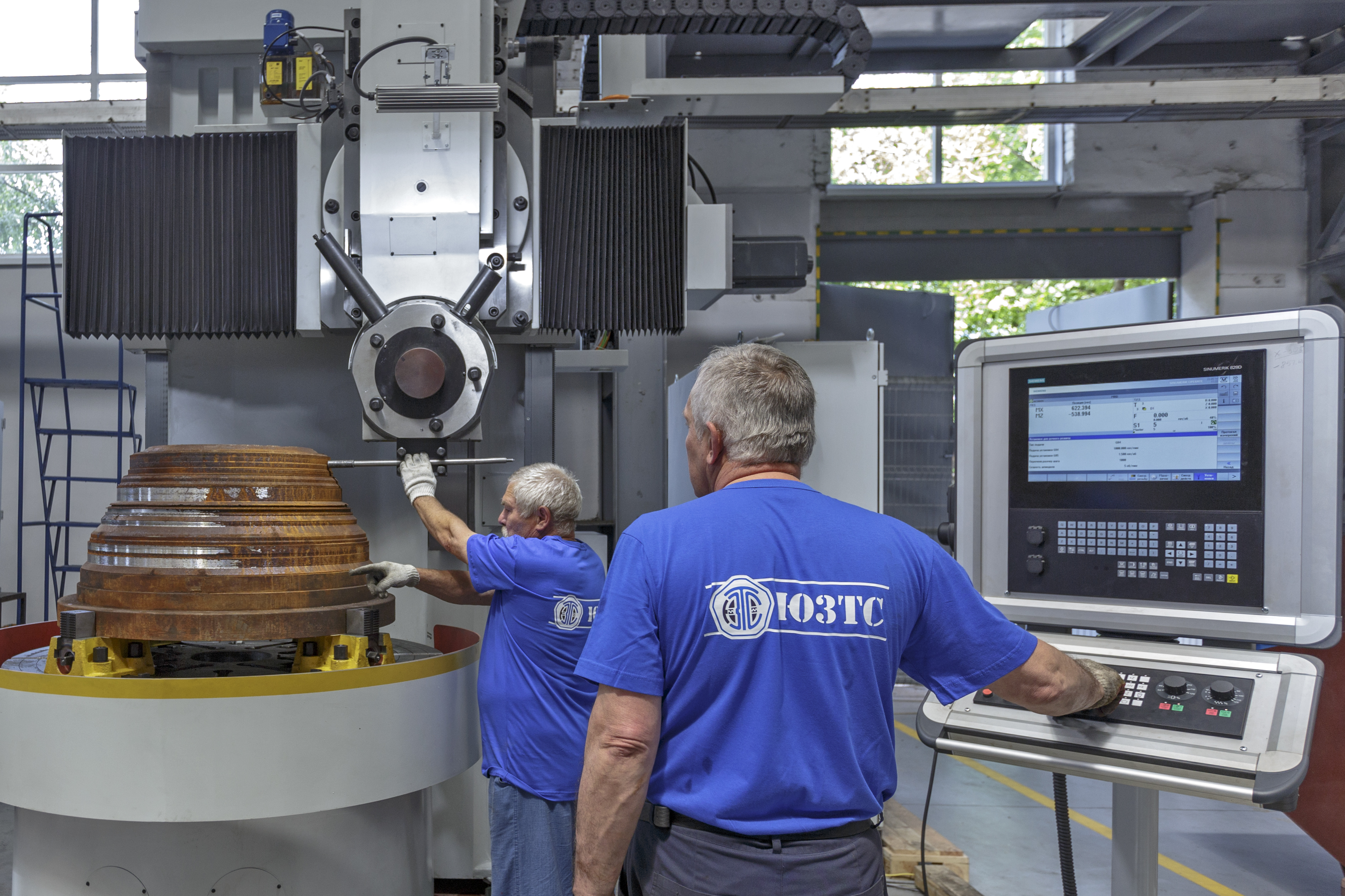 В ООО «Южный завод тяжёлого станкостроения» - ЮЗТС (преемник завода им. Г.М.Седина) успешно прошёл приёмо-сдаточные испытания и был принят представителями заказчика и ОТК первый станок изготовленный для предприятия из Евросоюза (Рига, Латвия)